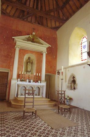 Vue intérieure de la Chapelle Saint Ortaire (privée), Manoir de Saint-Ortaire (50620 Le Dézert, Normandie, France) Photo prise et publiée par les propriétaires.